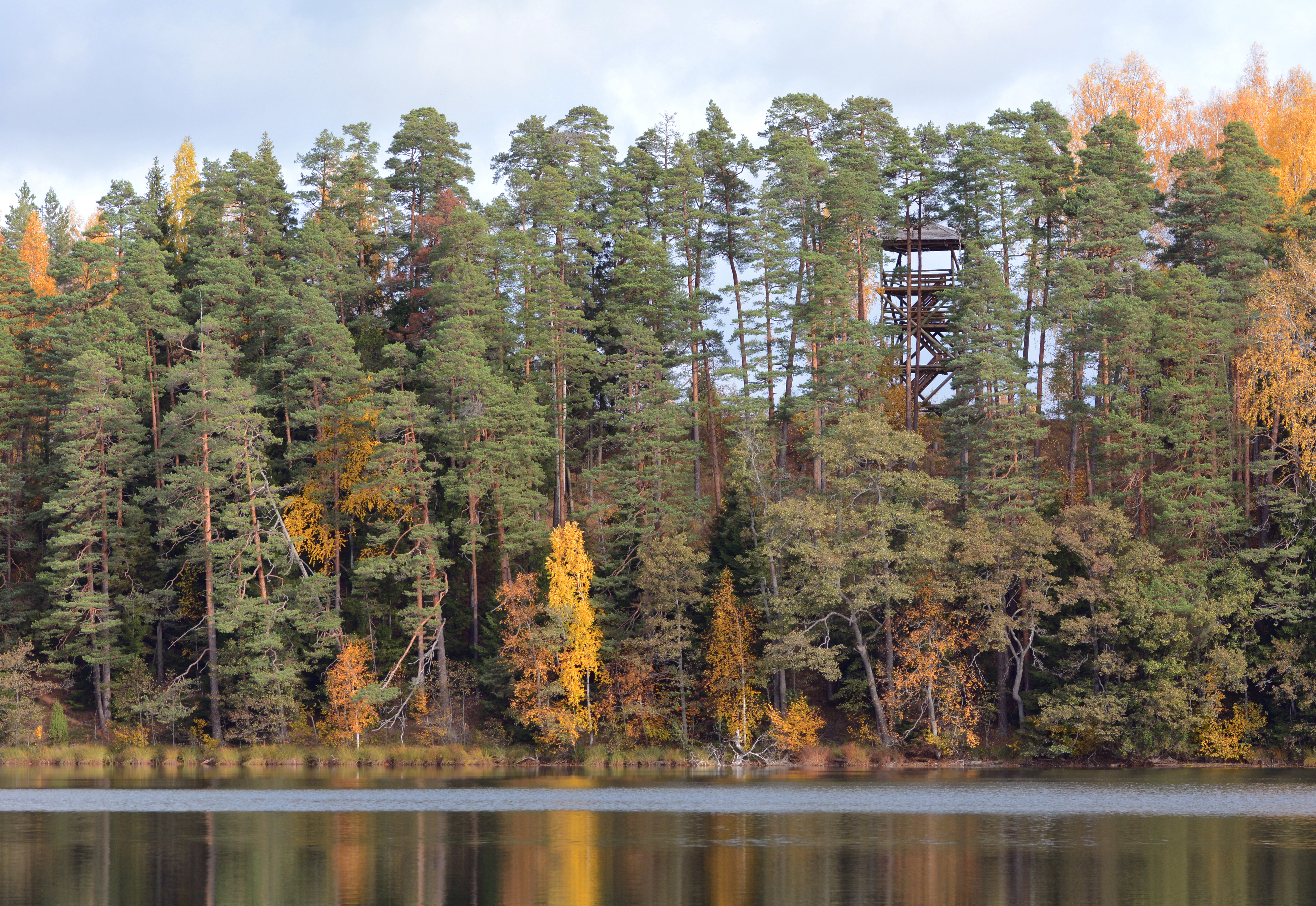 Vaade lääneküljelt